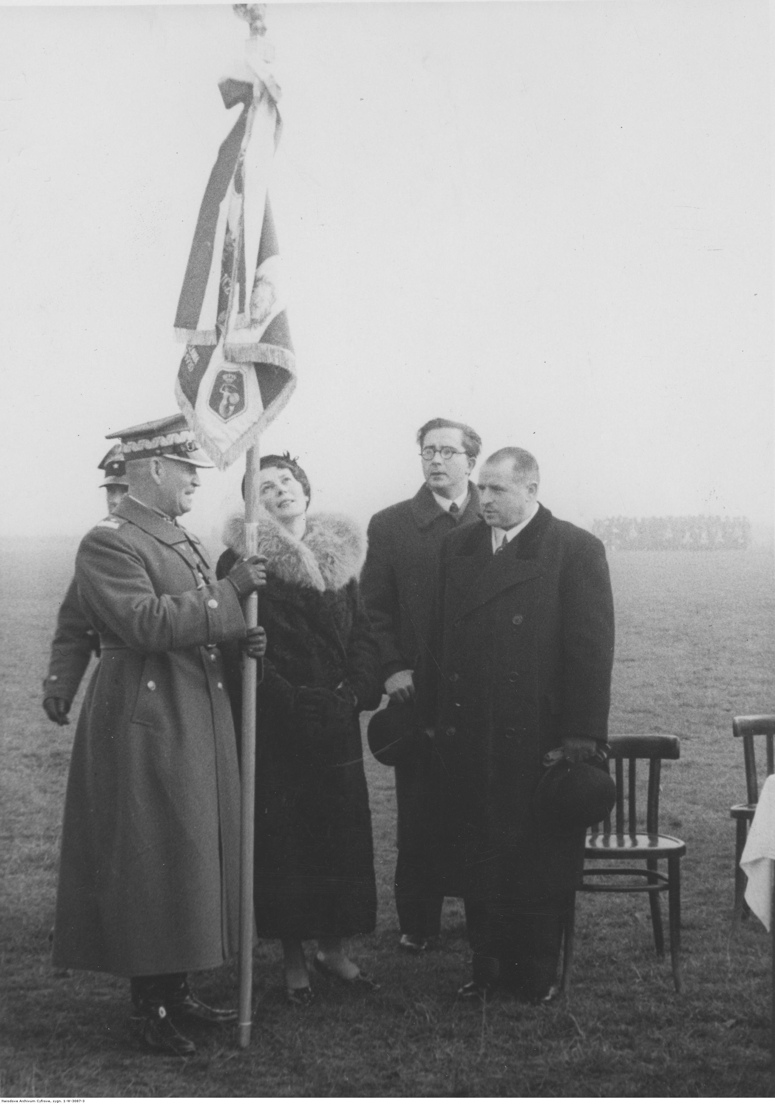 Wręczenie sztandarów artylerii przeciwlotniczej; listopad 1938. Z lewej gen. Józef Zając, z prawej prezydent Stefan Starzyński. Koncern Ilustrowany Kurier Codzienny - Archiwum Ilustracji. Sygnatura: 1-W-3087-3